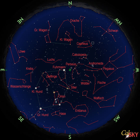 Sternhimmel im Winter (50° Breite, Mitte Jänner 21 Uhr) Berechnet mit Programm calSKY, siehe z. B. Geof 05:50, 23. Dez 2005 (CET)